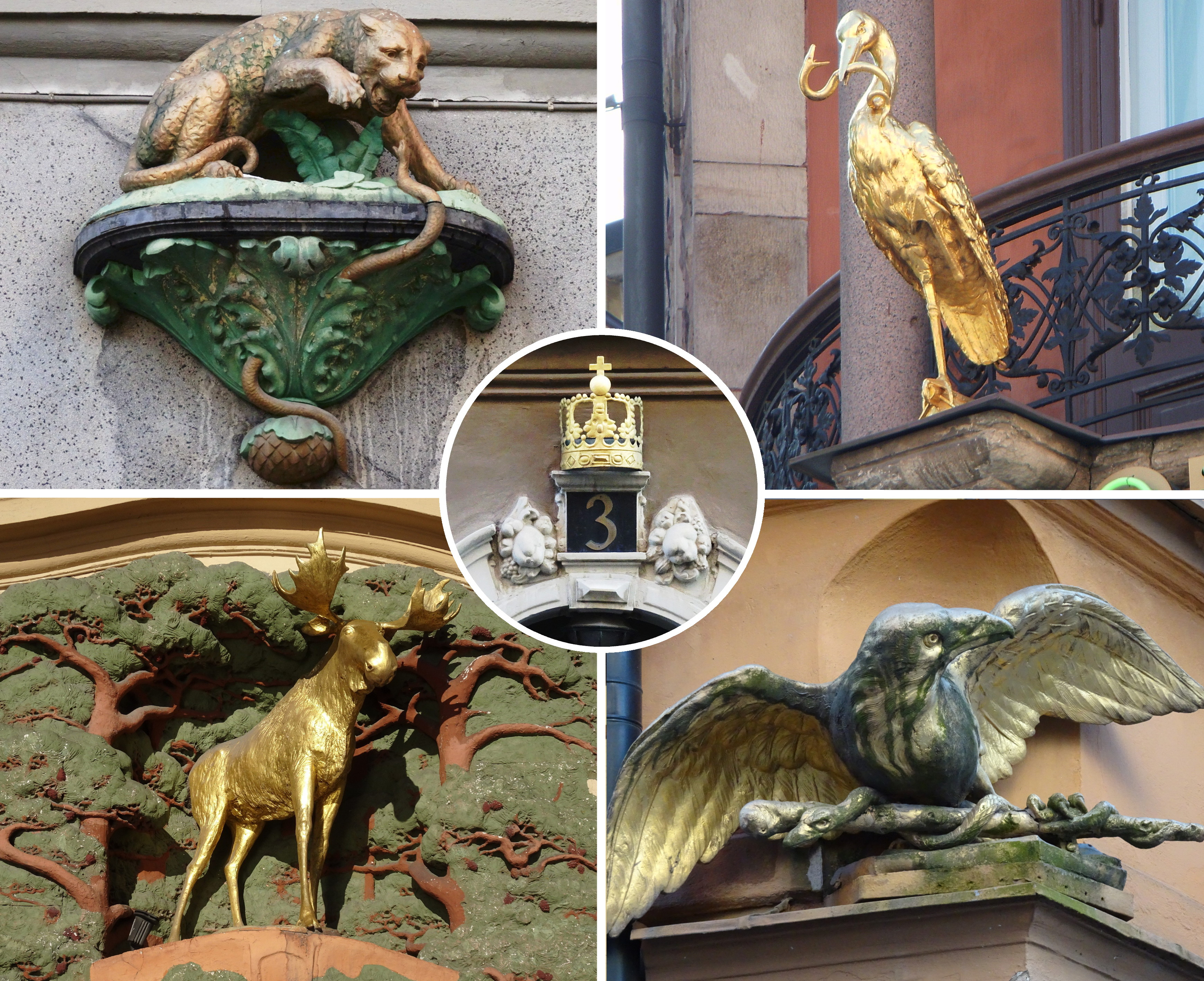 Kollage, apoteksemblemer för apoteken Leoparden, Storken, Elgen, Korpen, Kronan